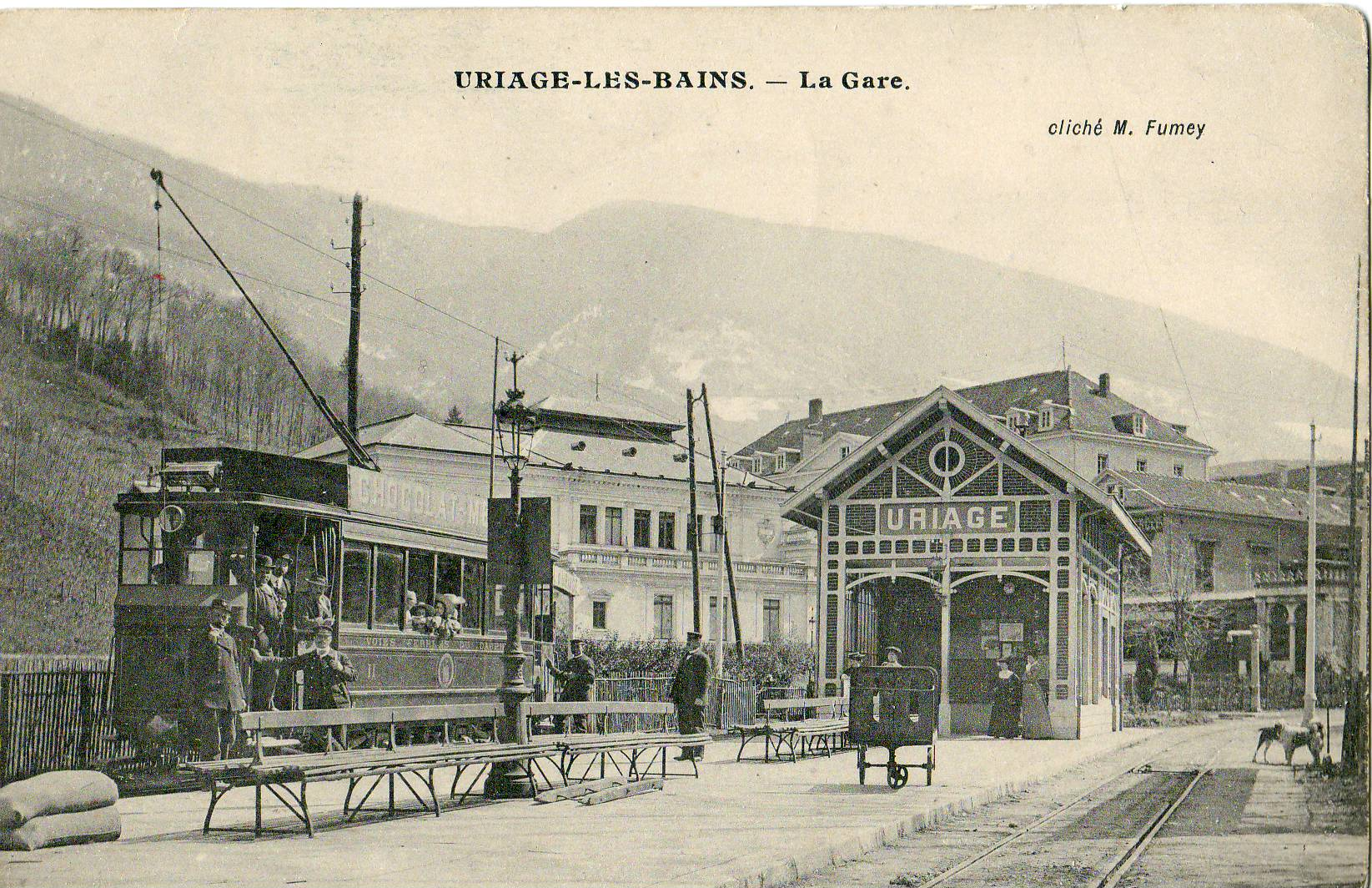 Carte postale ancienne éditée par Fumey : URIAGE (38) : La gare du tramway des Voies Ferrées du Dauphiné Ligne Grenoble - Vizille - Bourg d'Oisans